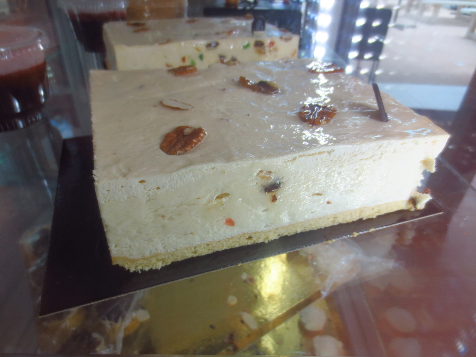 Entremet au Nougat